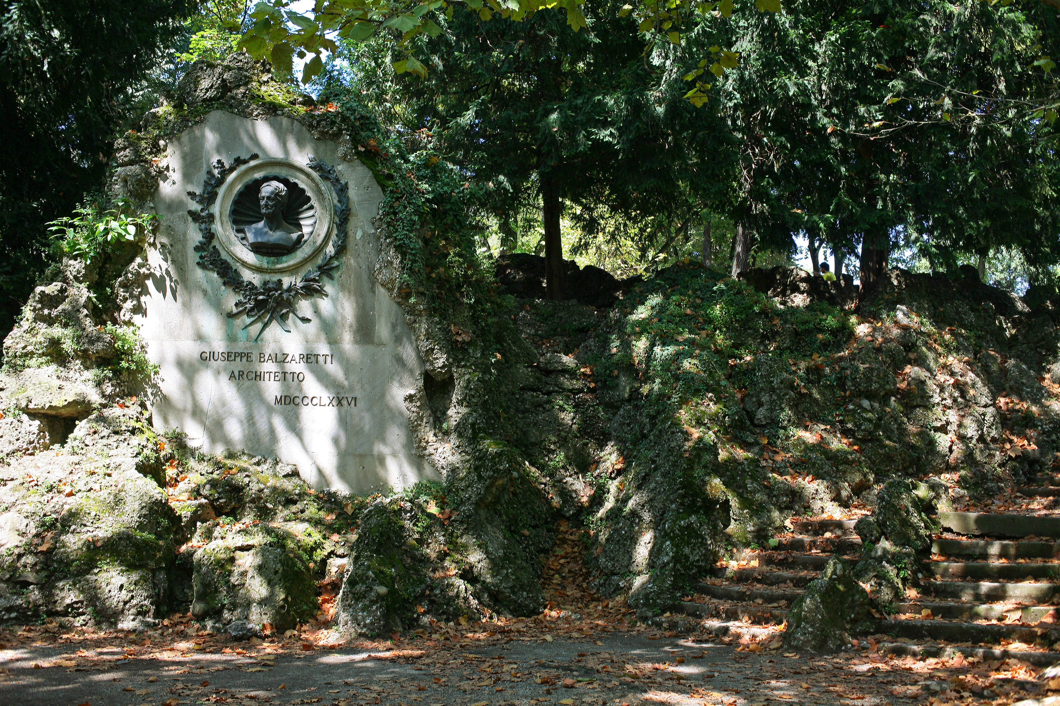 Monumento all'architetto Giuseppe Balzaretti (1876) ai Giardini di via Palestro, Milano